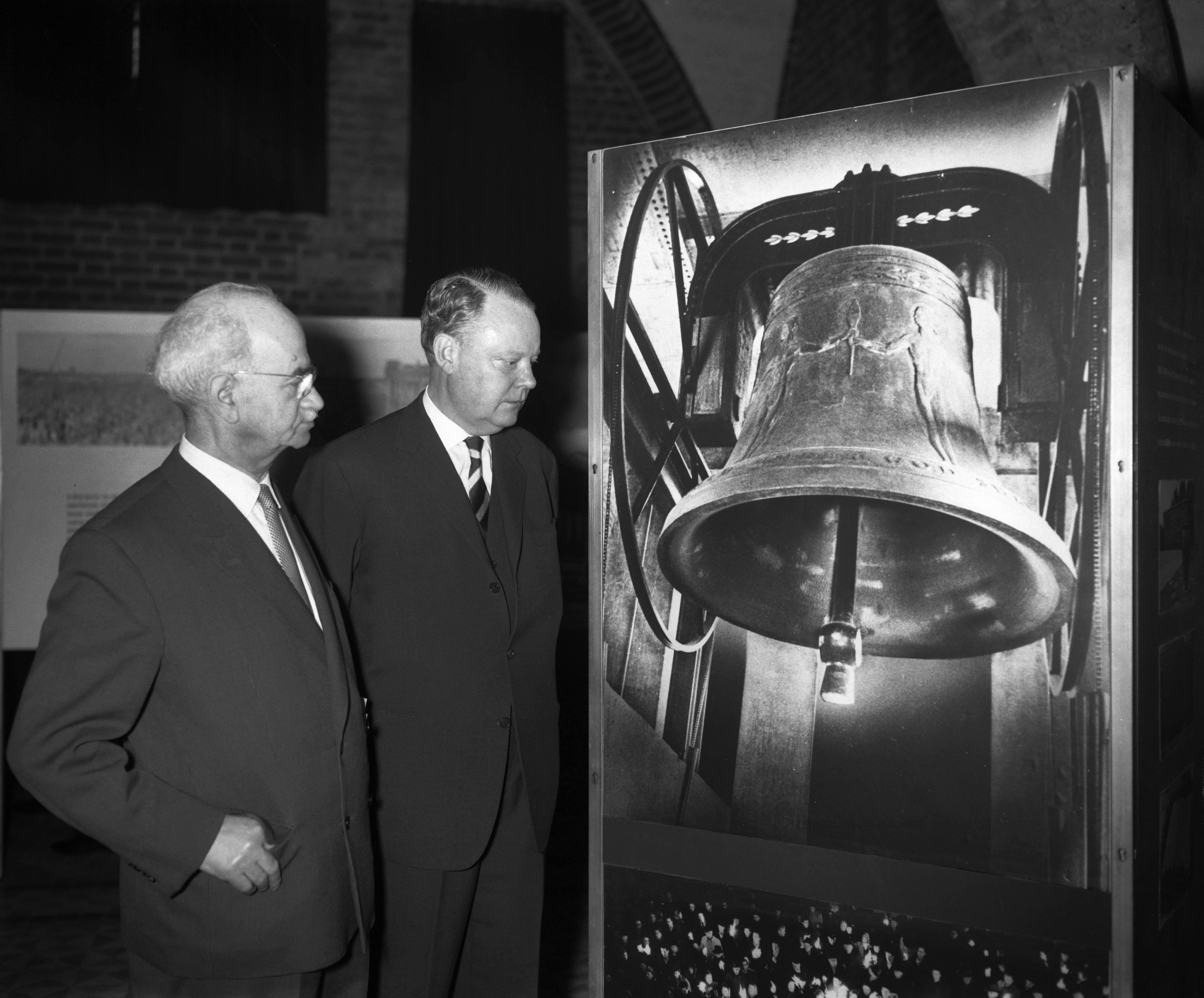 Collectie / Archief : Fotocollectie Anefo Reportage / Serie : [ onbekend ] Beschrijving : Opening Tentoonstelling "Berlijn bolwerk der vrijheid" door dr. J. Lons Datum : 1 maart 1961 Trefwoorden : Openingen Persoonsnaam : dr. J. Lons Fotograaf : Bilsen, Joop van / Anefo Auteursrechthebbende : Nationaal Archief Materiaalsoort : Negatief (zwart/wit) Nummer archiefinventaris : bekijk toegang 2.24.01.04 Bestanddeelnummer : 912-1590